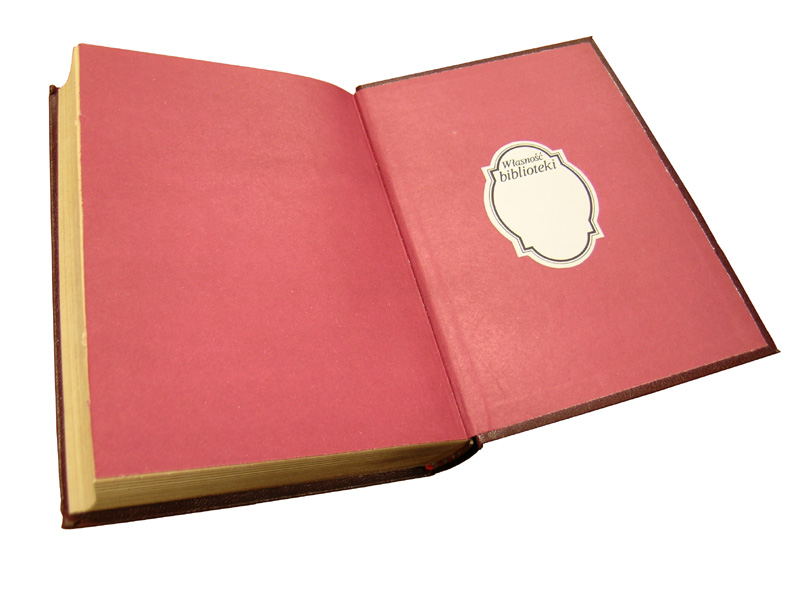 Książka wydana w Drukarni Bibliotecznej "Książnica" Data: 2005-11-21 Autor: stAn